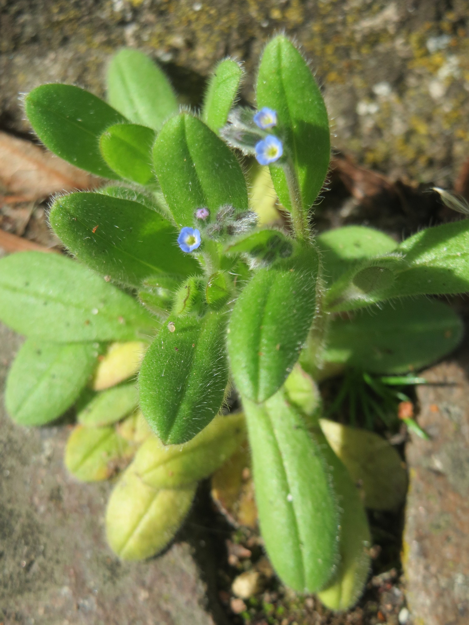 Acker-Vergissmeinnicht (Myosotis arvensis) in Hockenheim